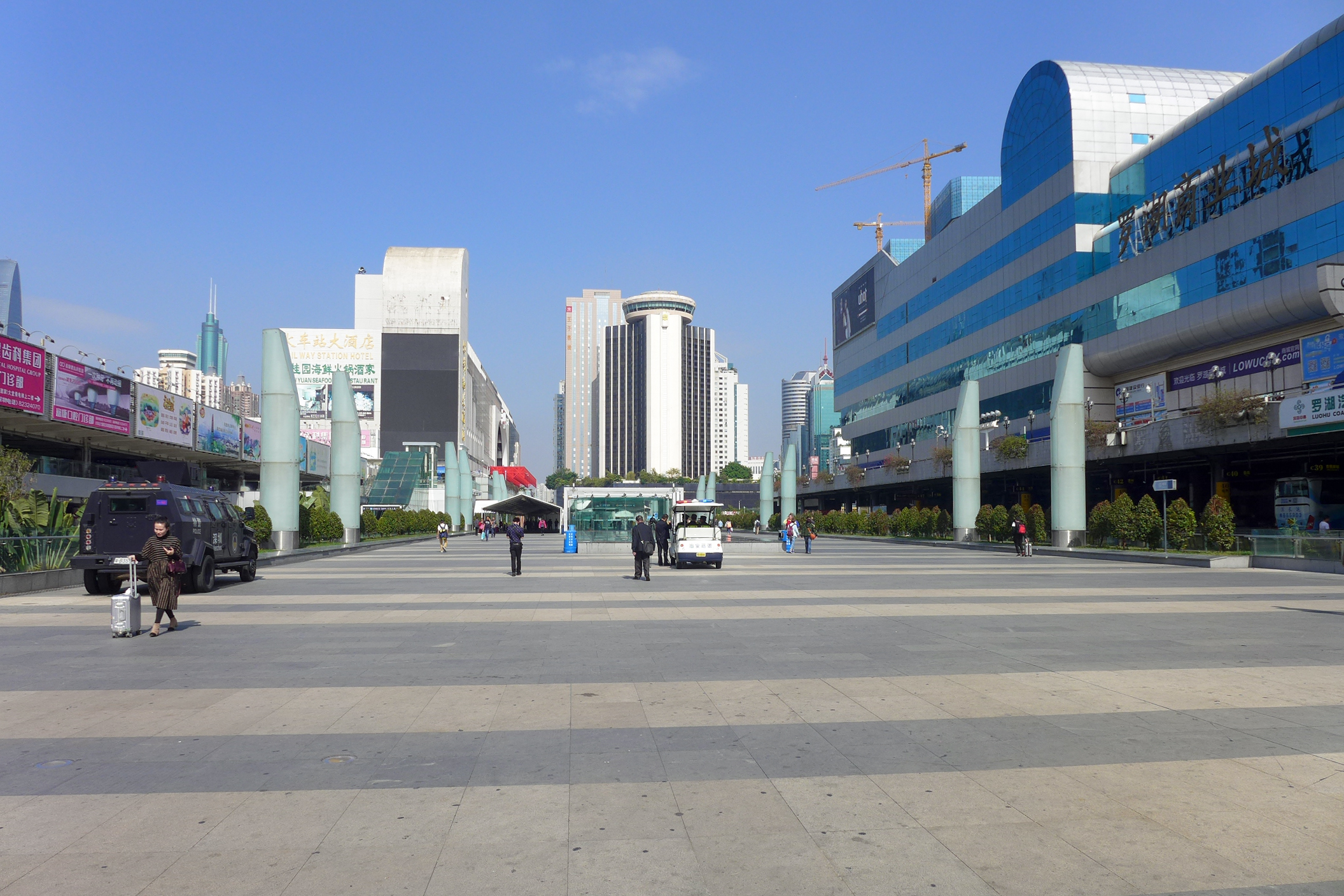 Shenzhen Station Plaza